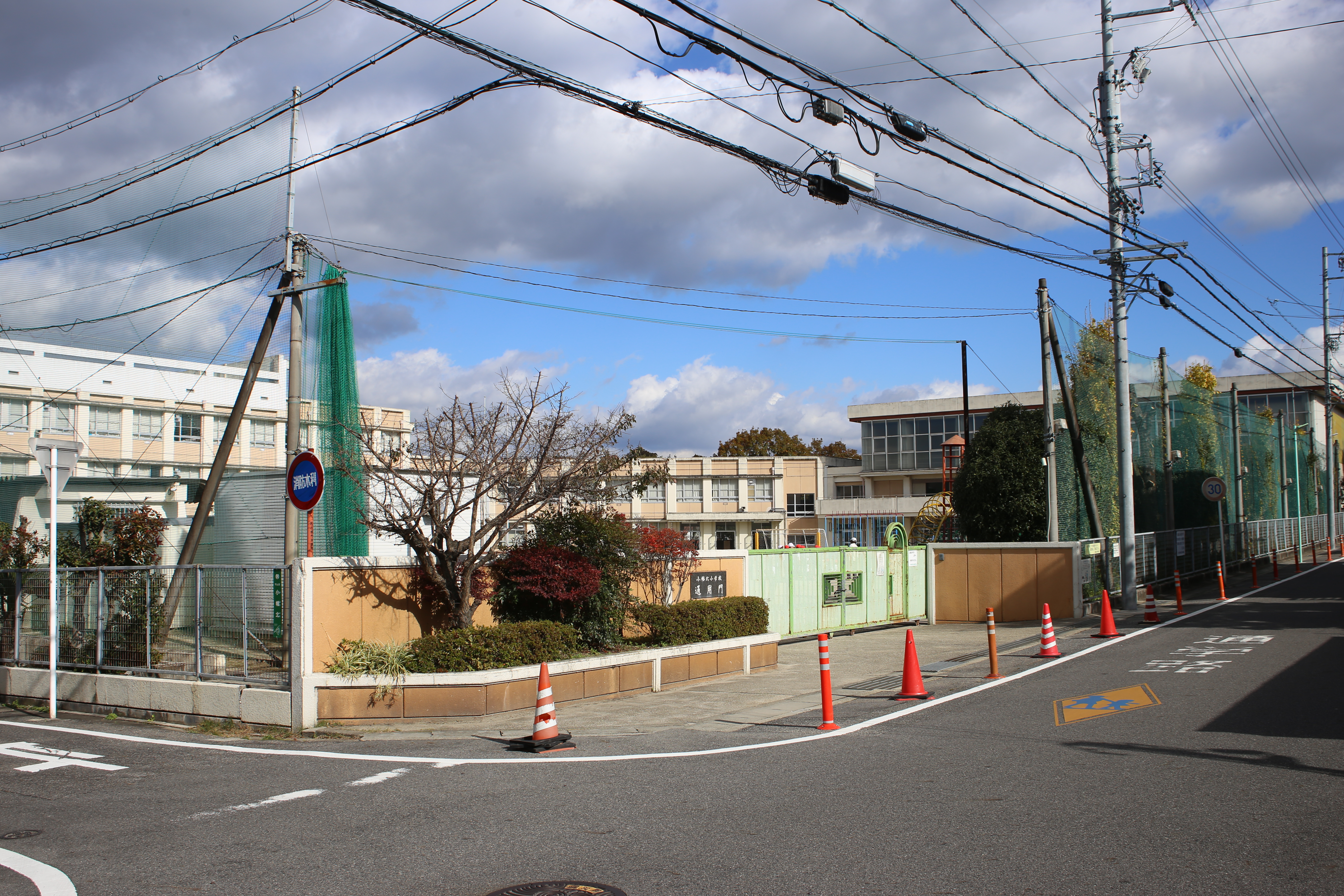 名古屋市守山区小幡北の名古屋市立小幡北小学校